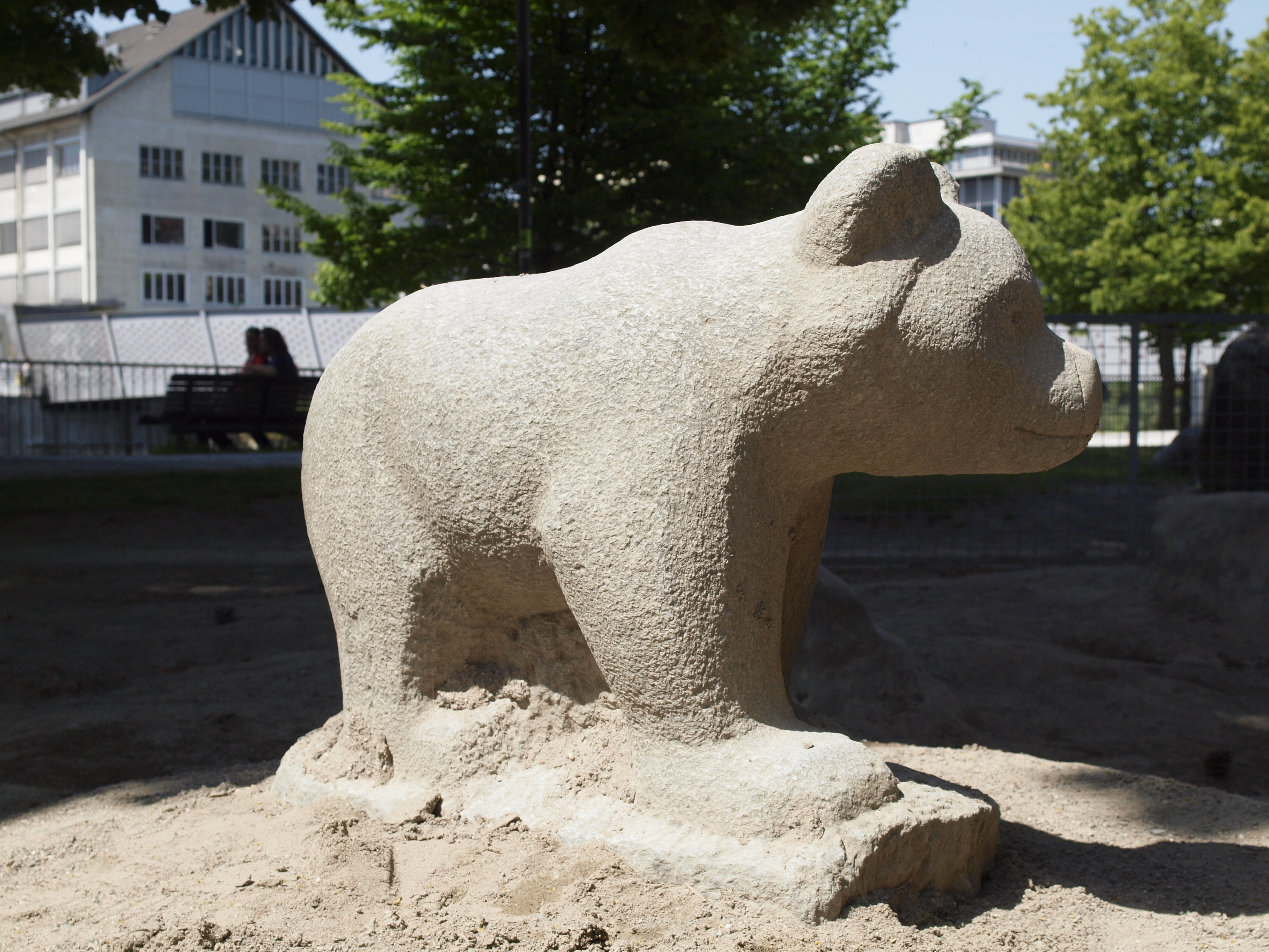 Die Skulptur "Bär" wurde von Arnold Huggler 1958 geschaffen. Sie ist in der Aussenanlage -im Sandkasten- des Gemeinschaftszentrum Wipkigen aufgestellt.